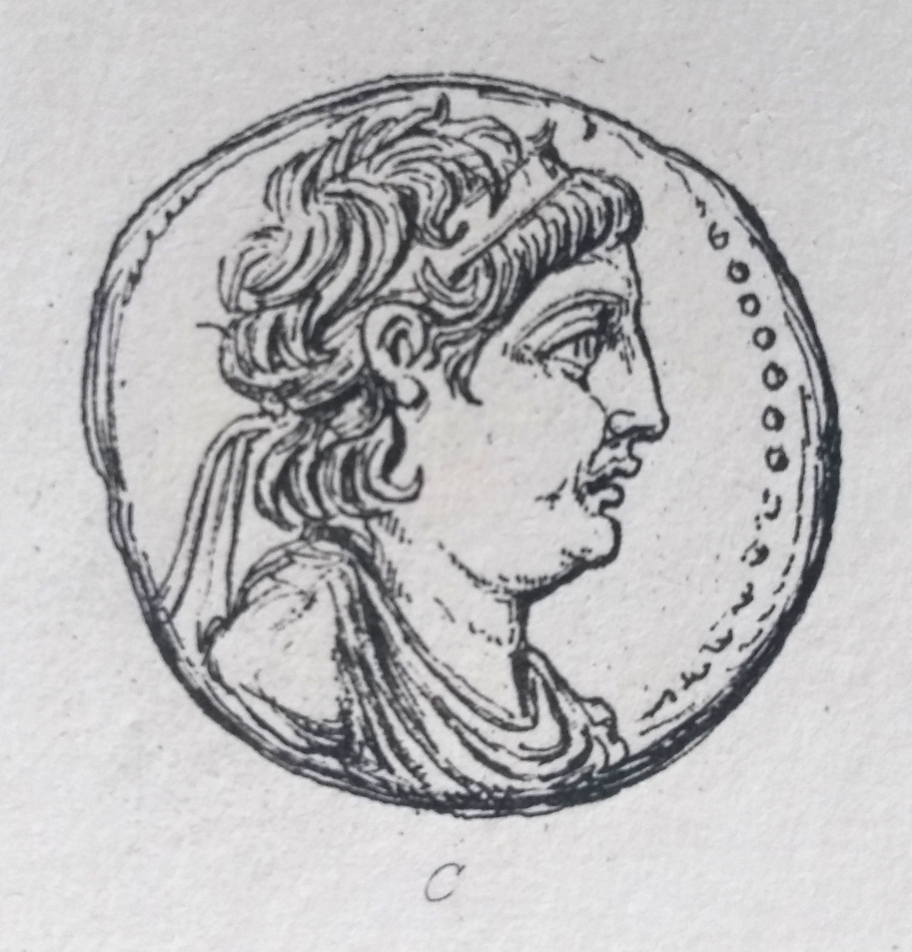 Münze des Antiochos VII., Umzeichnung